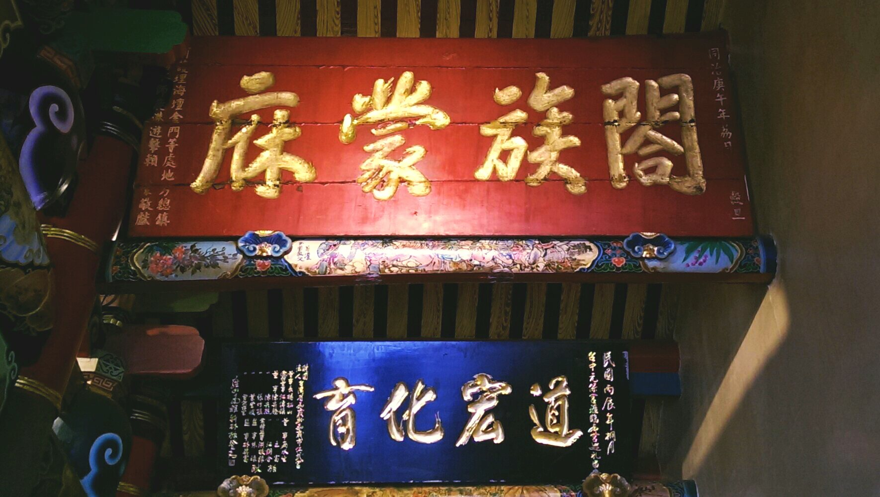 元保宮-閤族蒙庥匾